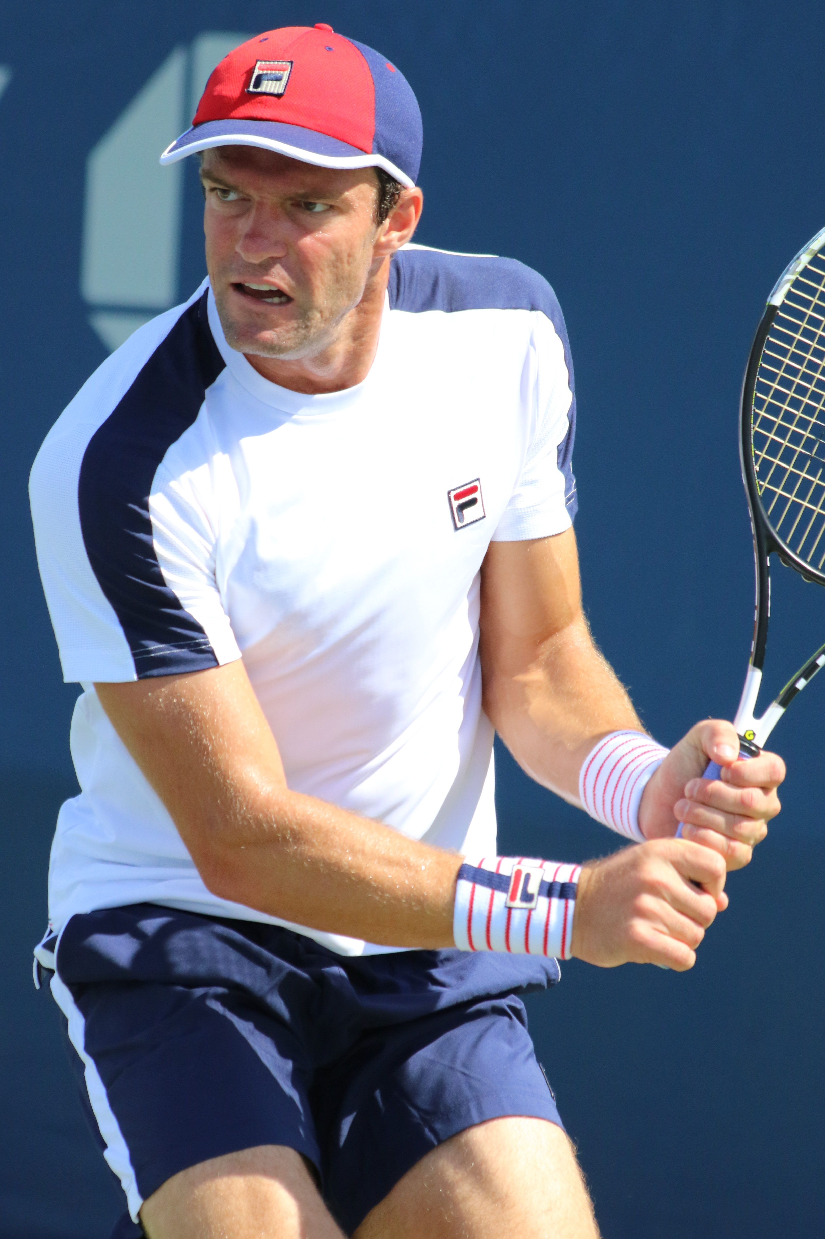 Gabashvili US16 (7)